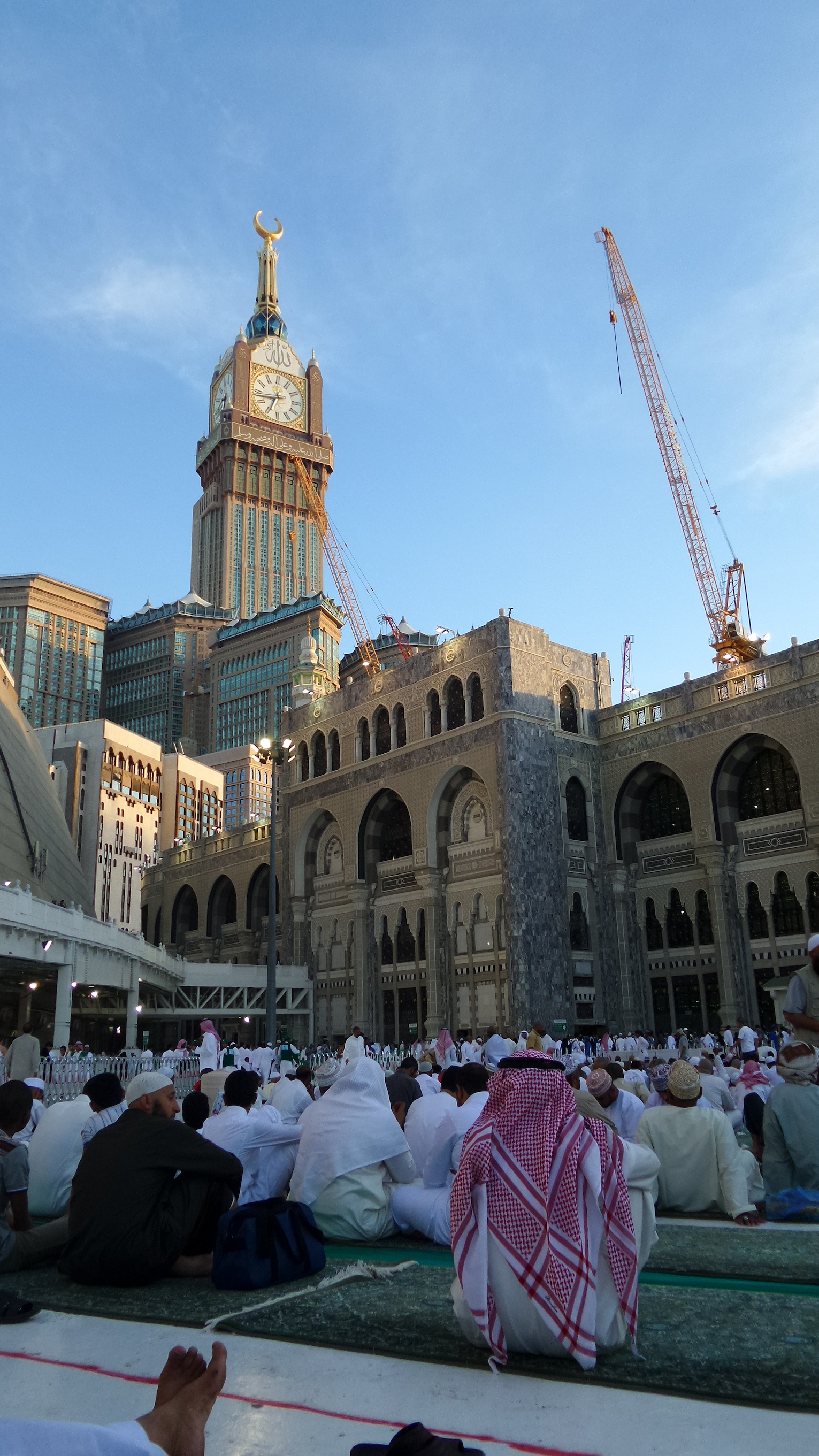 Mount Abu Kubais, Ajyad, Mecca 24231, Saudi Arabia